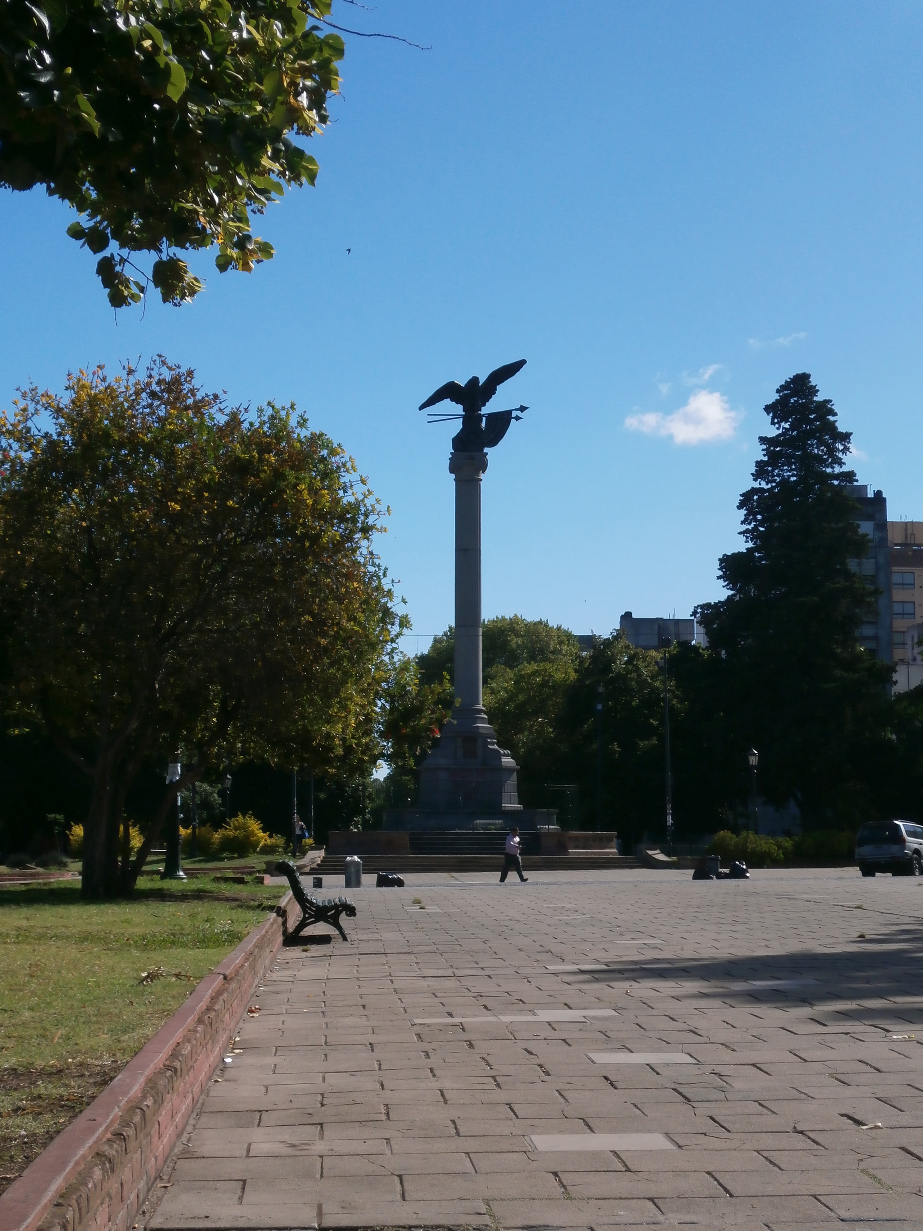 Vista de la Plaza Italia y su columna monumental, en la ciudad argentina de La Plata.